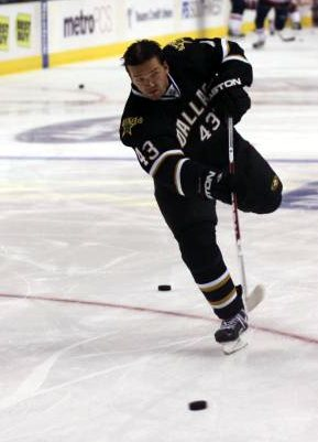 #43 Phillipe Boucher, Dallas Stars